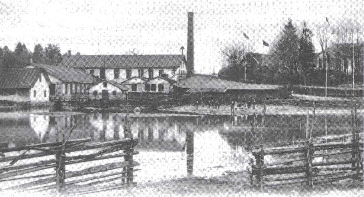 Bild över Stensholms Fabriks AB från 1900. Skaparen är okänd.